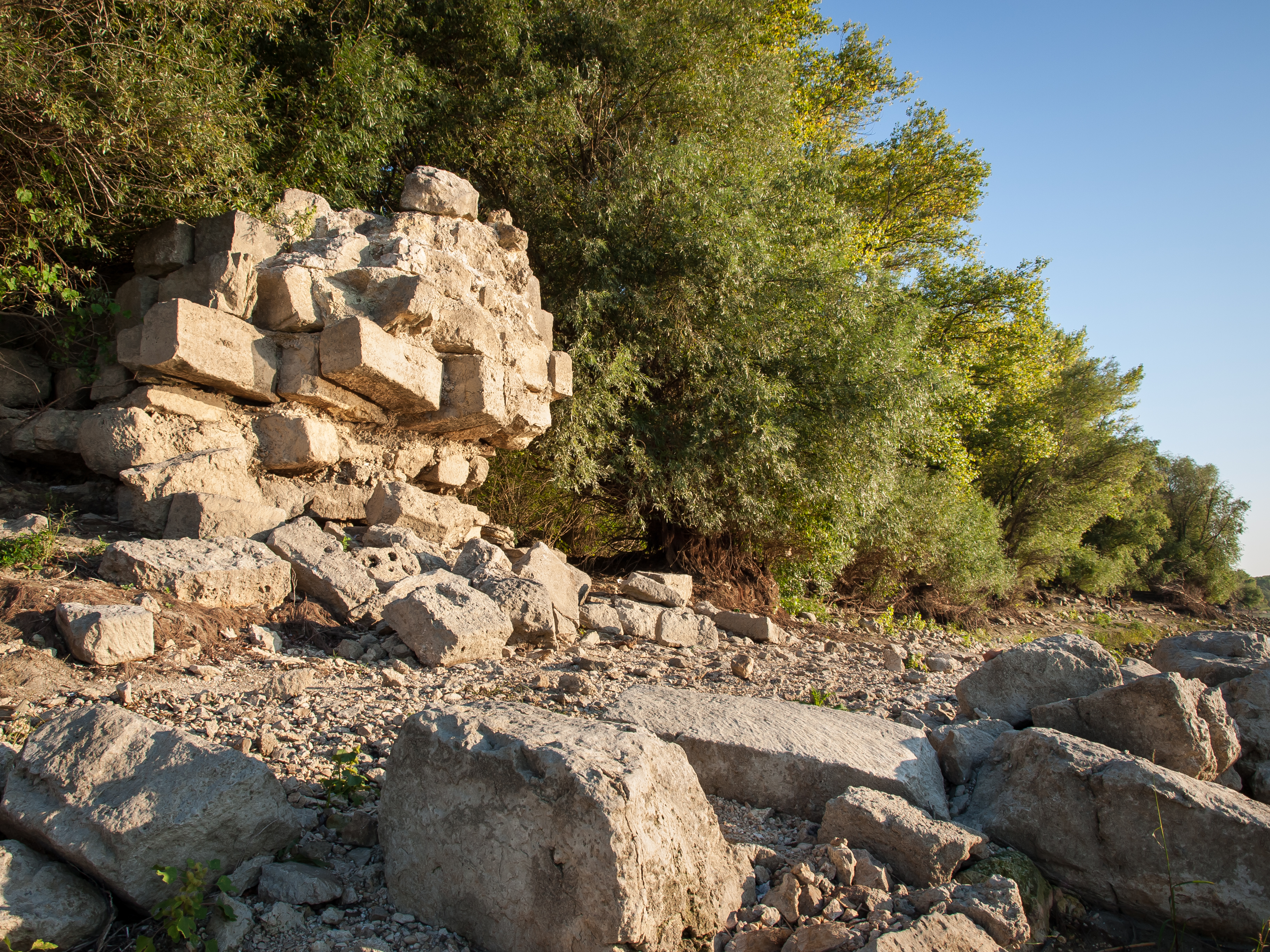 Cetatea bizantină din insula Păcuiul lui Soare